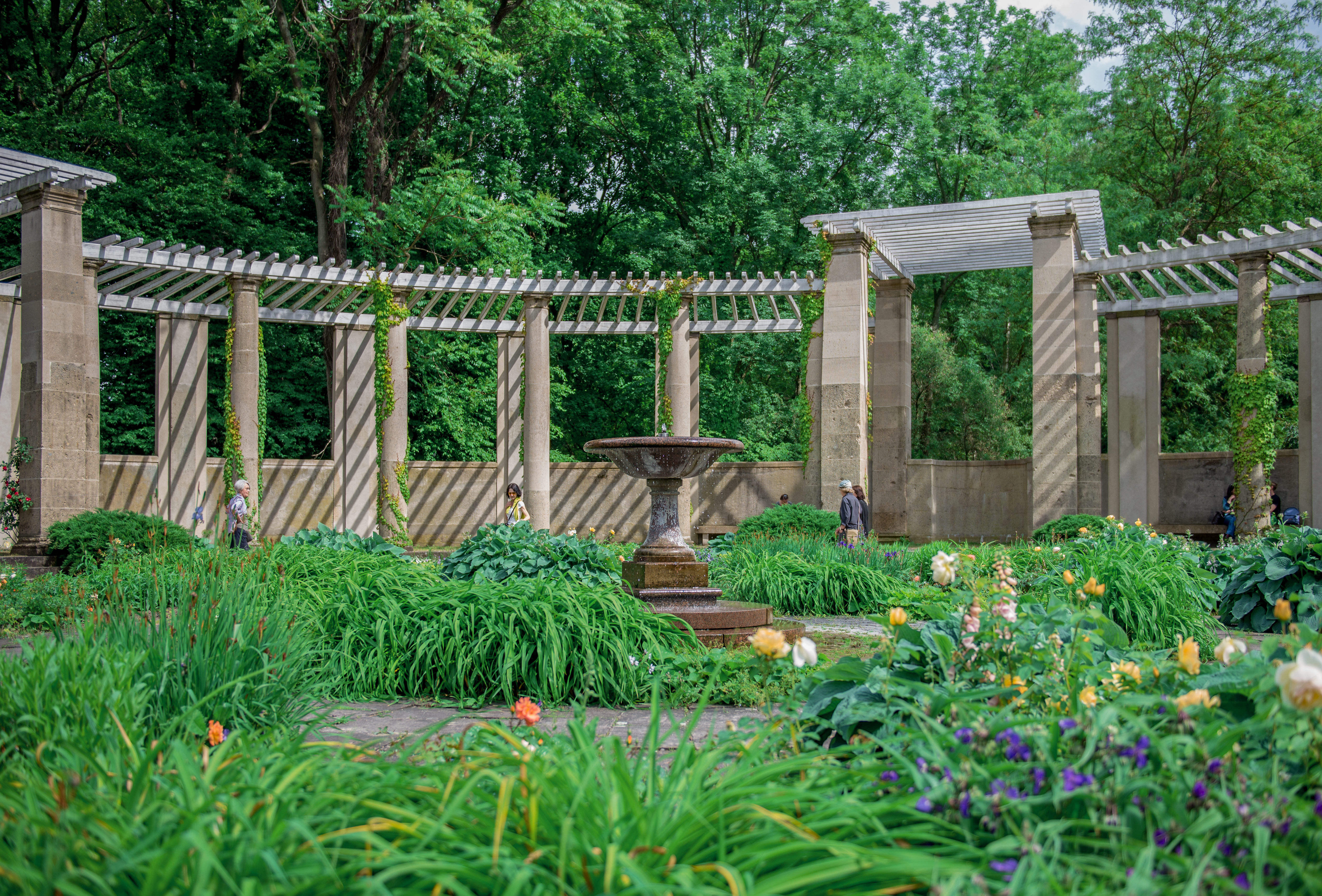 Berlin Großer Tiergarten Pergola im Rosengarten